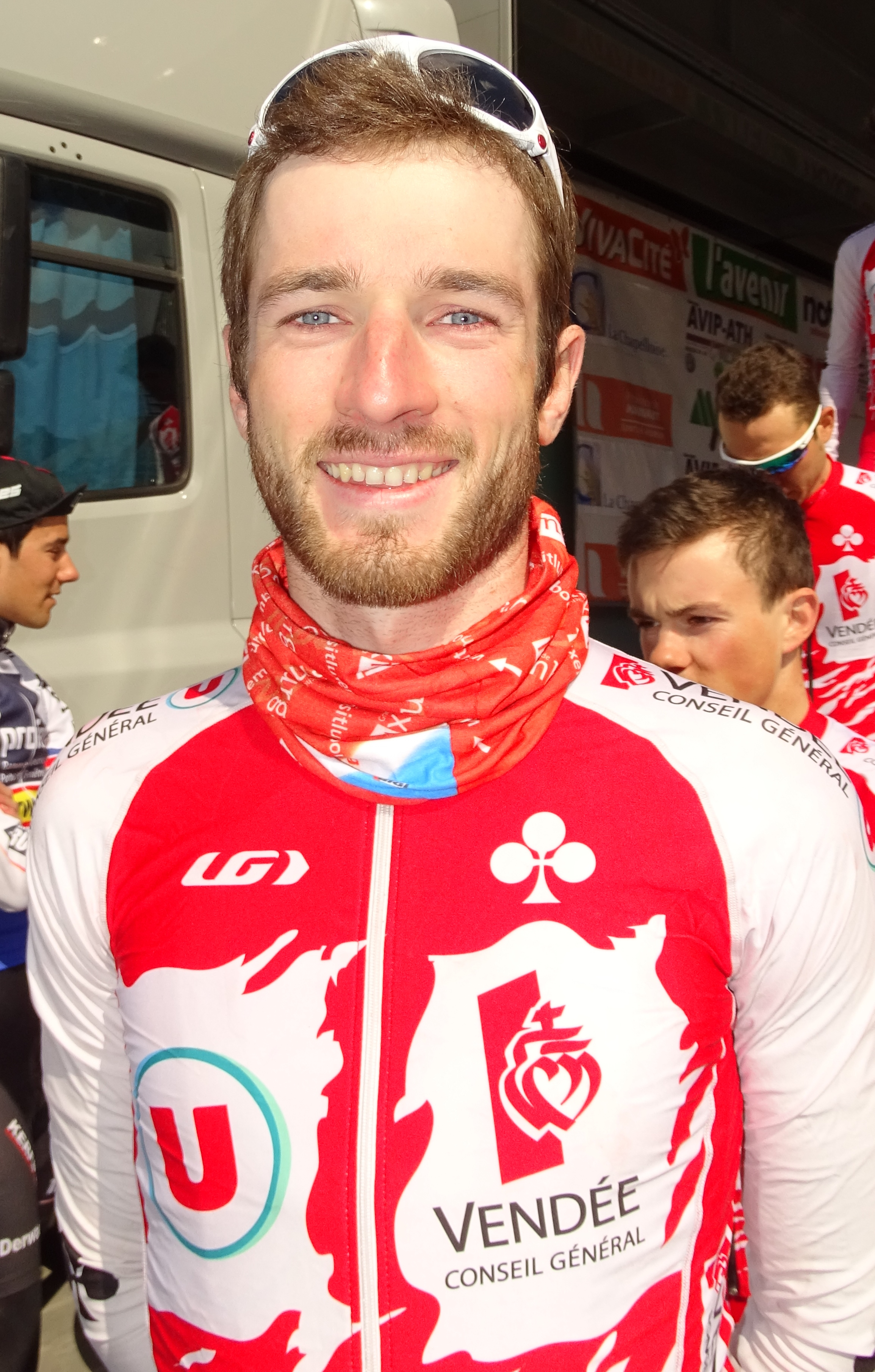 Triptyque des Monts et Châteaux 2015 Depicted person: Jérémy Cornu Depicted team: Vendée U